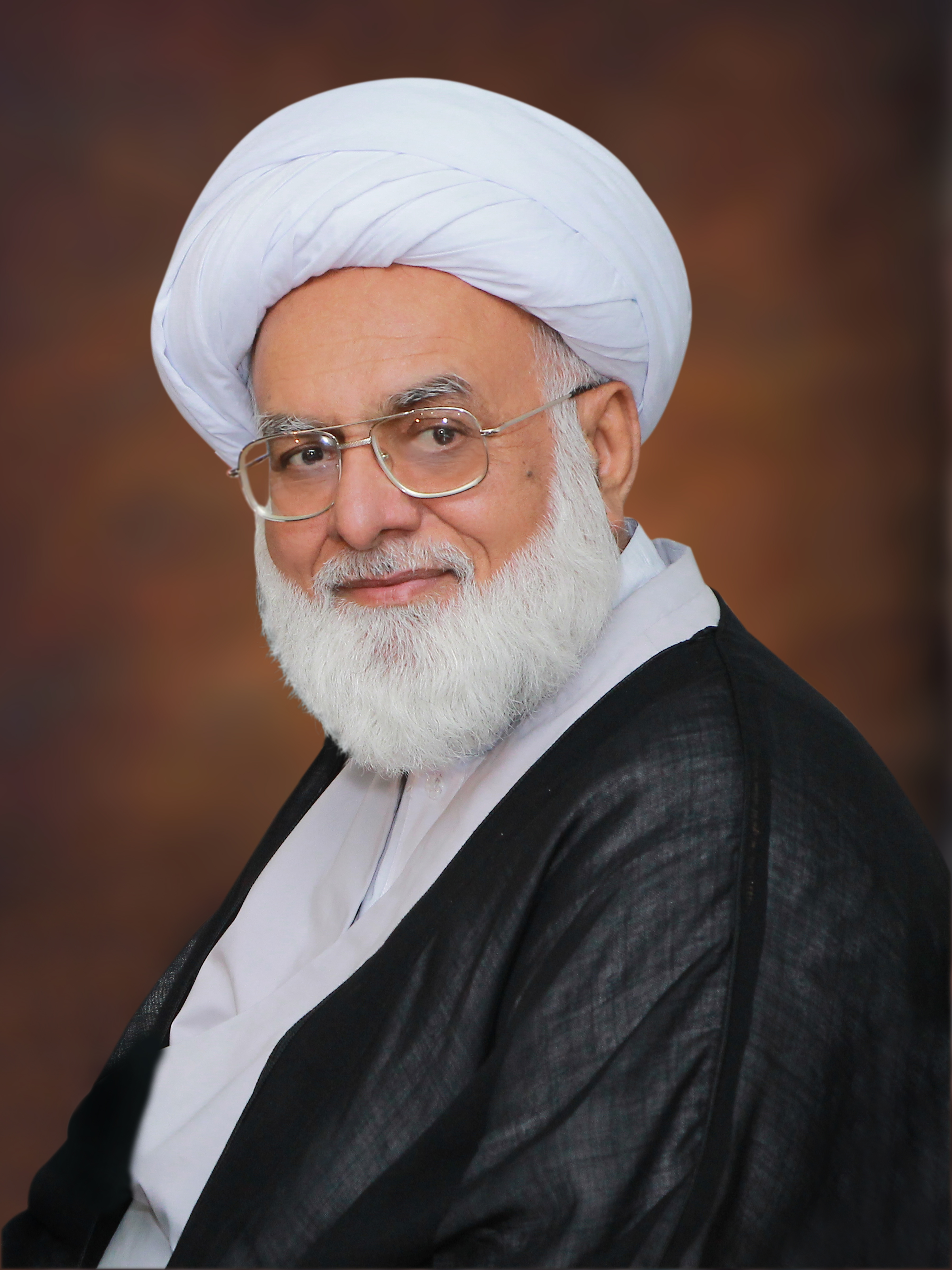 بانی و سرپرست اعلیٰ ادارہ منہاج الحسین پاکستان